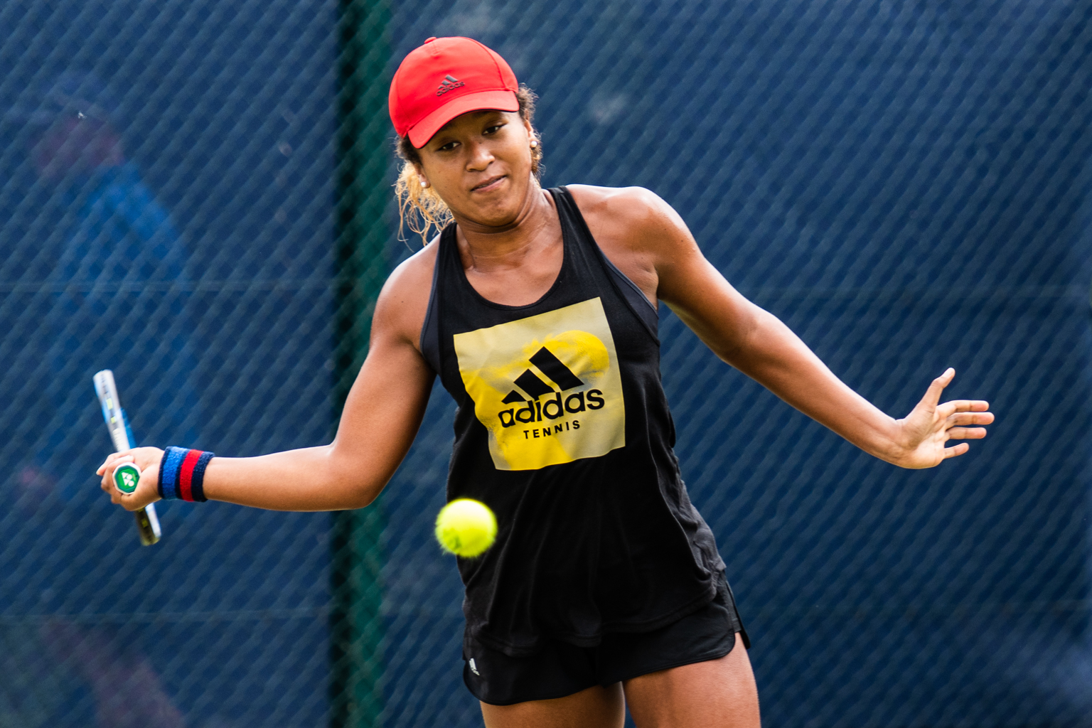 Naomi Osaka